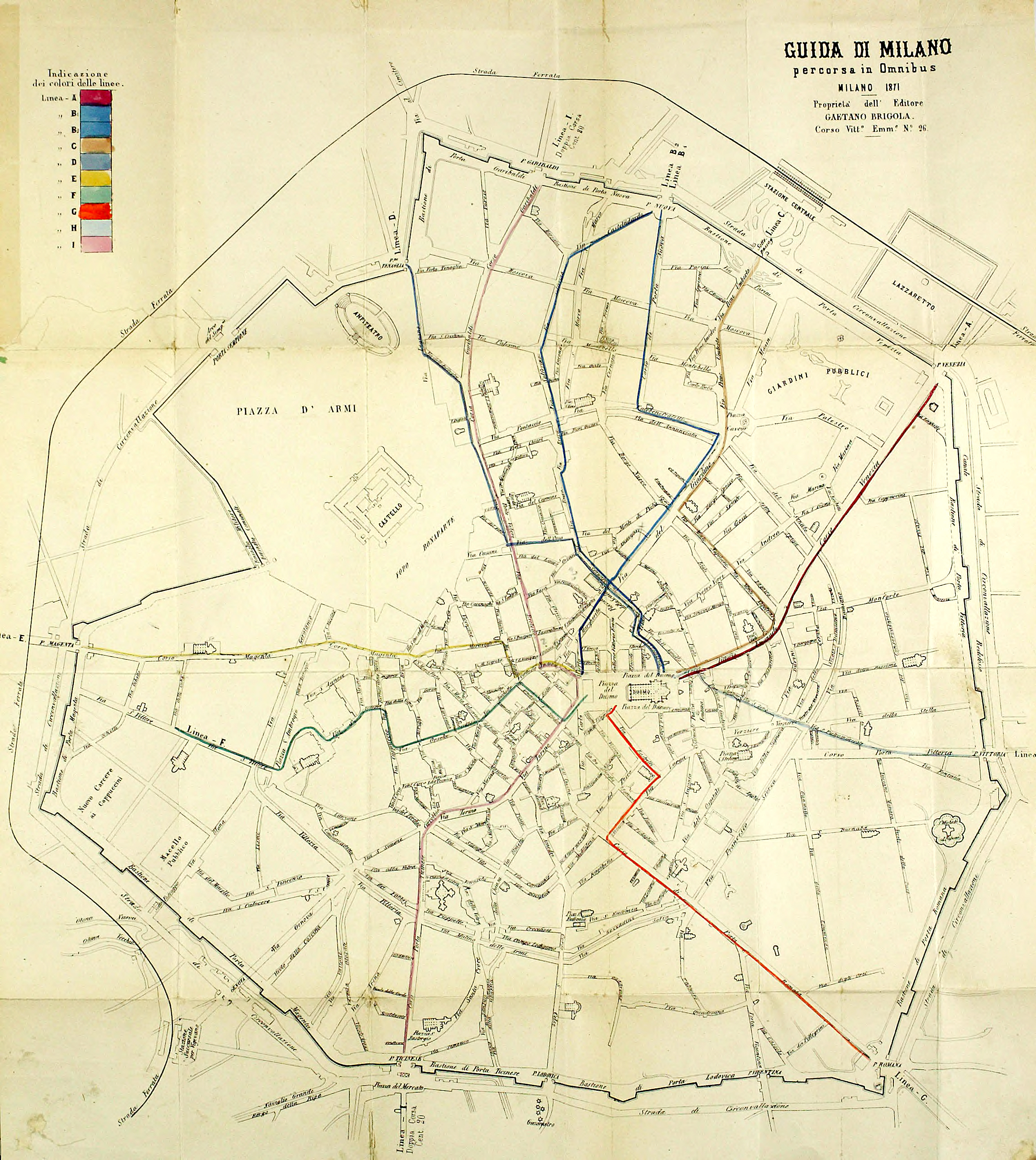 Mappa delle linee di omnibus a Milano nell'anno 1871, tratta dall'opera di Felice Venosta "Milano percorsa in Omnibus [...]", Milano 1871